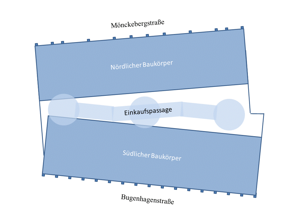 Grundrissskizze Levantehaus in Hamburg, Deutschland. Ground plan of the shopping mall Levantehaus in Hamburg, Germany.